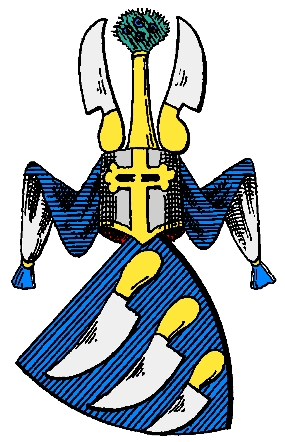 Wappen derer von der Zesterfleth